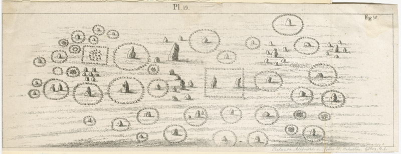 RAÄ-nr: Klövedal 105:1. Gravfält i Pilane, består av ett 90-tal fornlämningar. Illustration i N. H. Sjöborgs Samlingar för Nordens fornälskare, b 1 fig 56, 1822. Motiv: Klövedal 105:1 Kategori: Teckning, Gravfält RAÄ-nr: Klövedal 105:1. Gravfält i Pilane, består av ett 90-tal fornlämningar. Illustration i N. H. Sjöborgs Samlingar för Nordens fornälskare, b 1 fig 56, 1822. Klövedal 105:1.